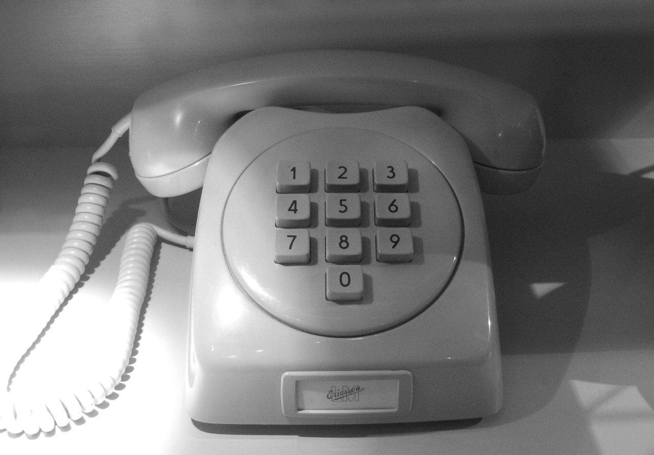 Dialogtelefonen med knappsats